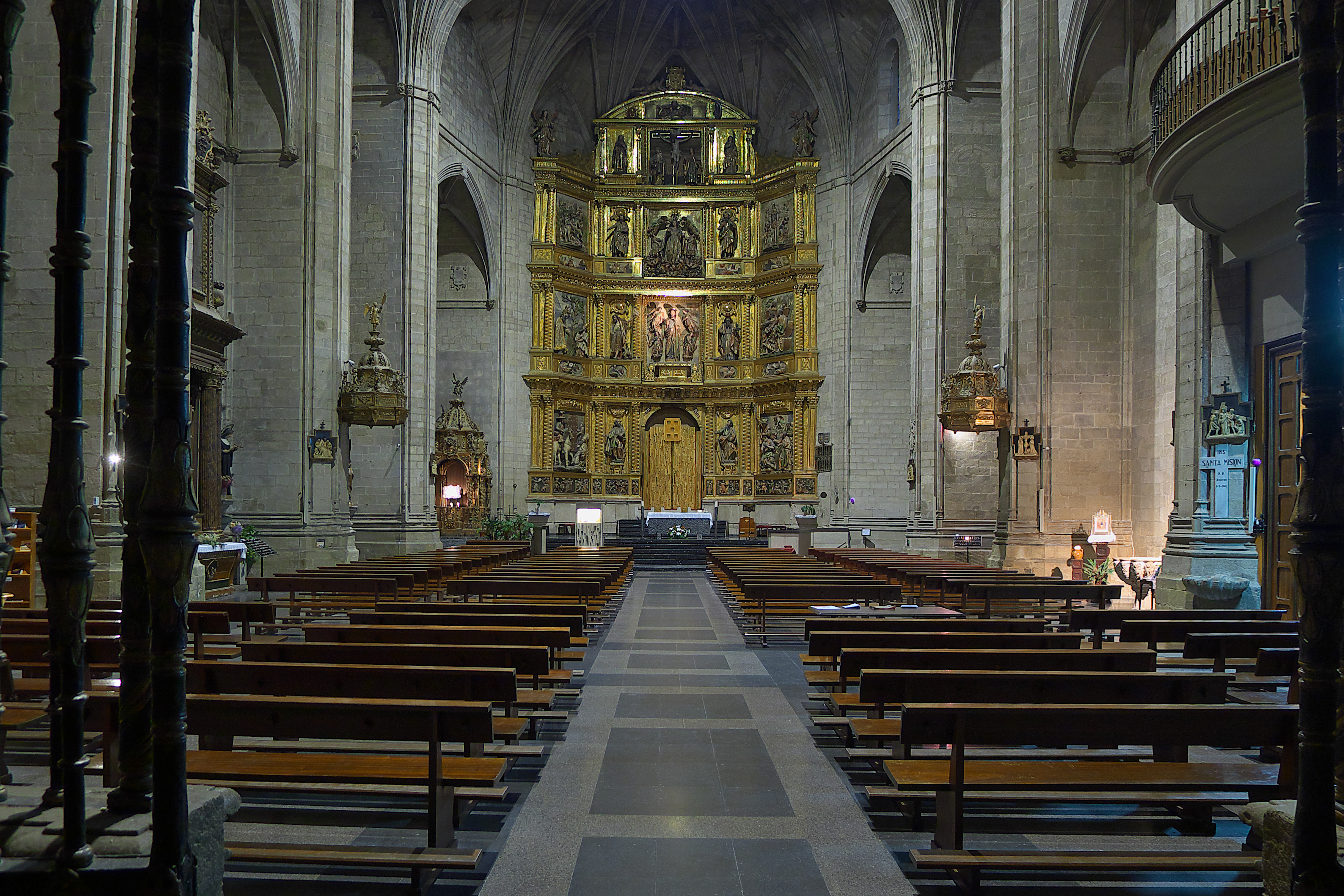 Destaca principalmente el proyecto de una sola nave en planta de anchura próxima a los veinte metros y altura de más de cuarenta. Emplea en la bóvedas elementos góticos.